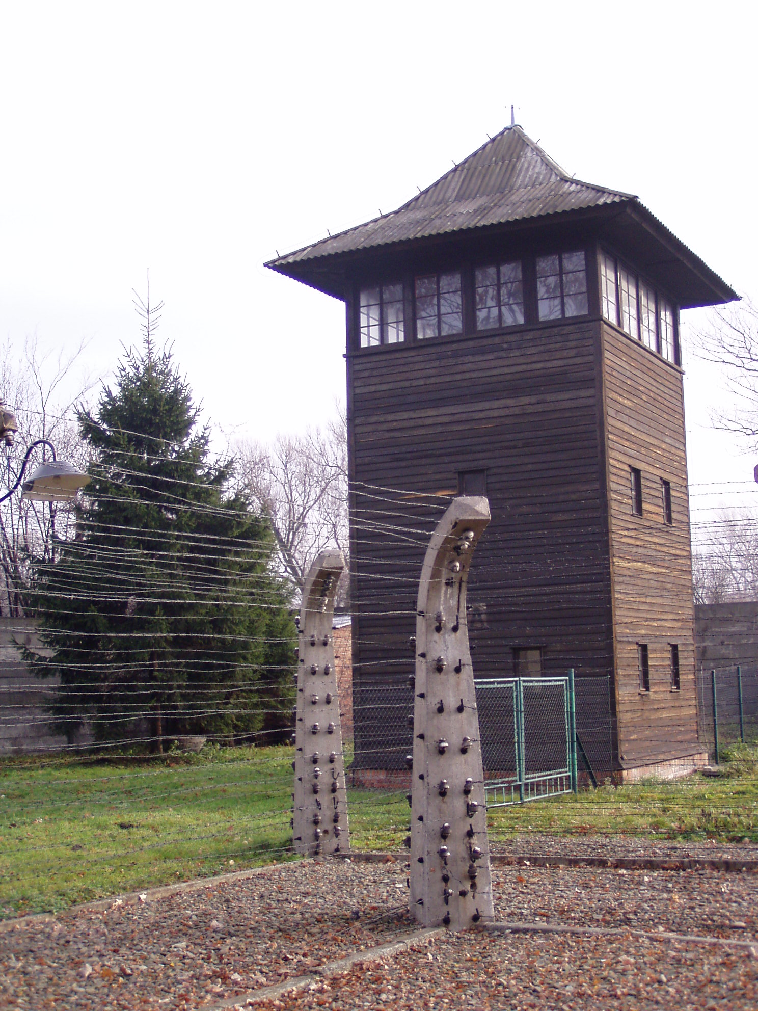 Strážní věž v koncentračním táboře Auschwitz I.